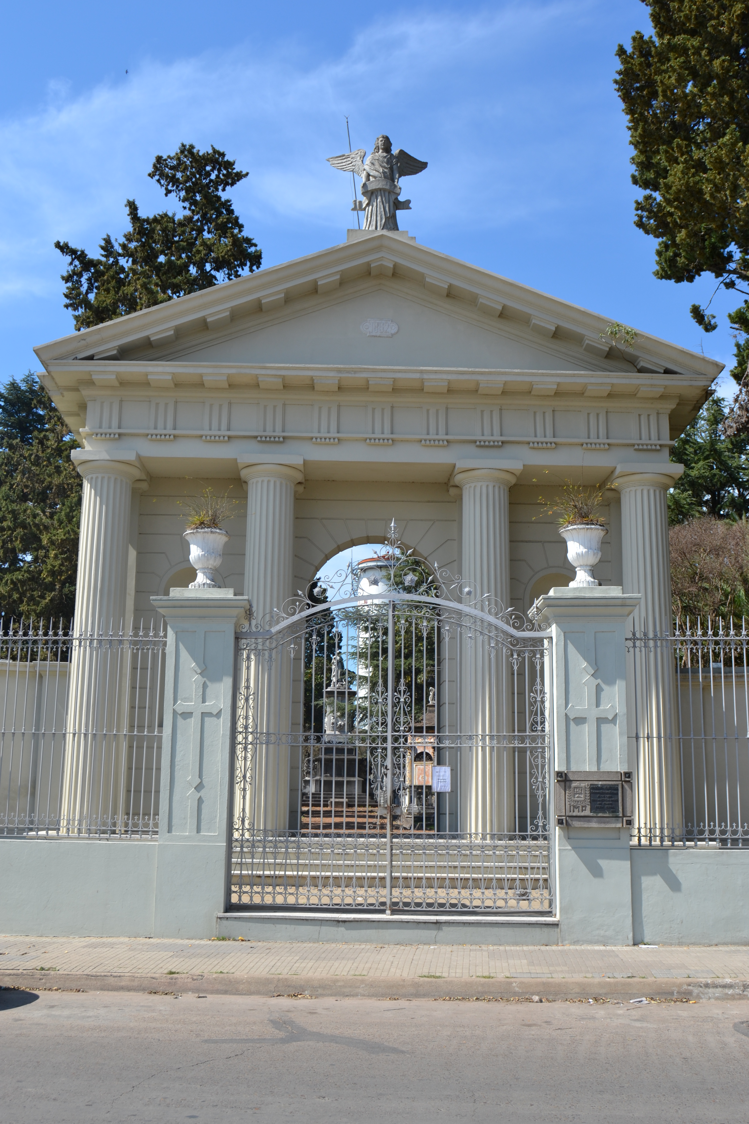 Monumento a Perpetuidad o Cementerio Viejo. Ubicada en el departamento de Paysandú